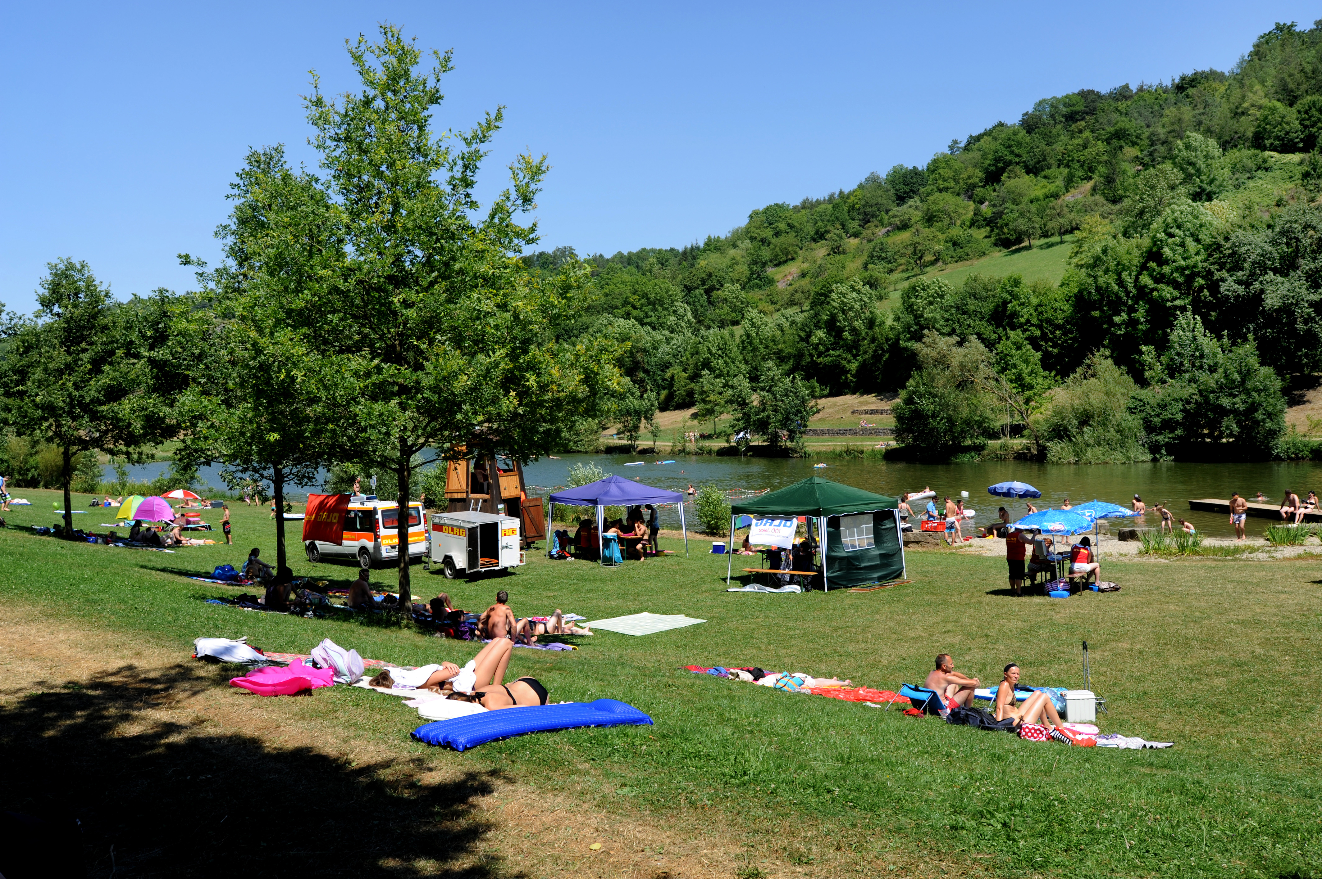 Strandbad am Münstersee.